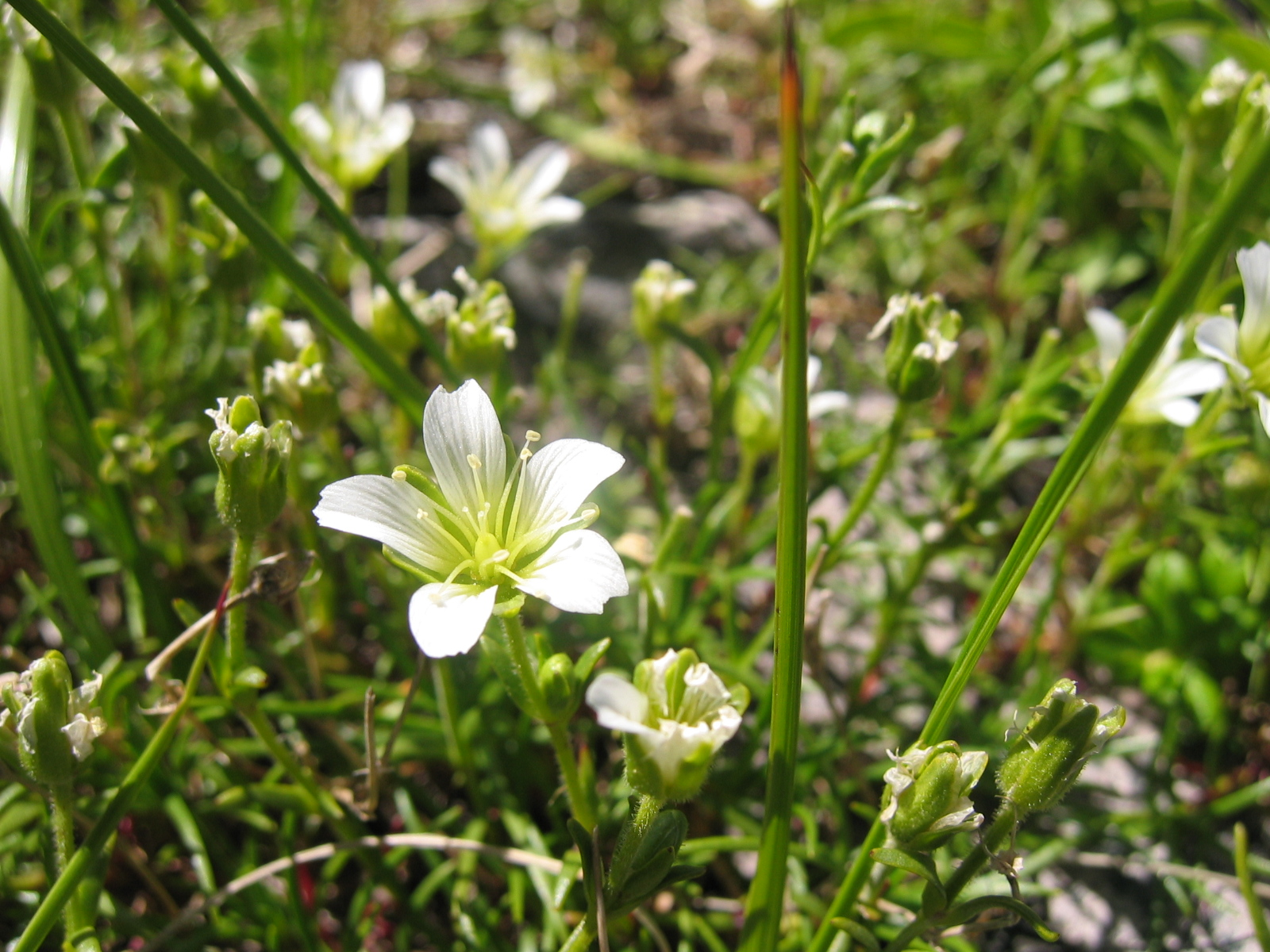 2006年8月5日、利用者自身の撮影。